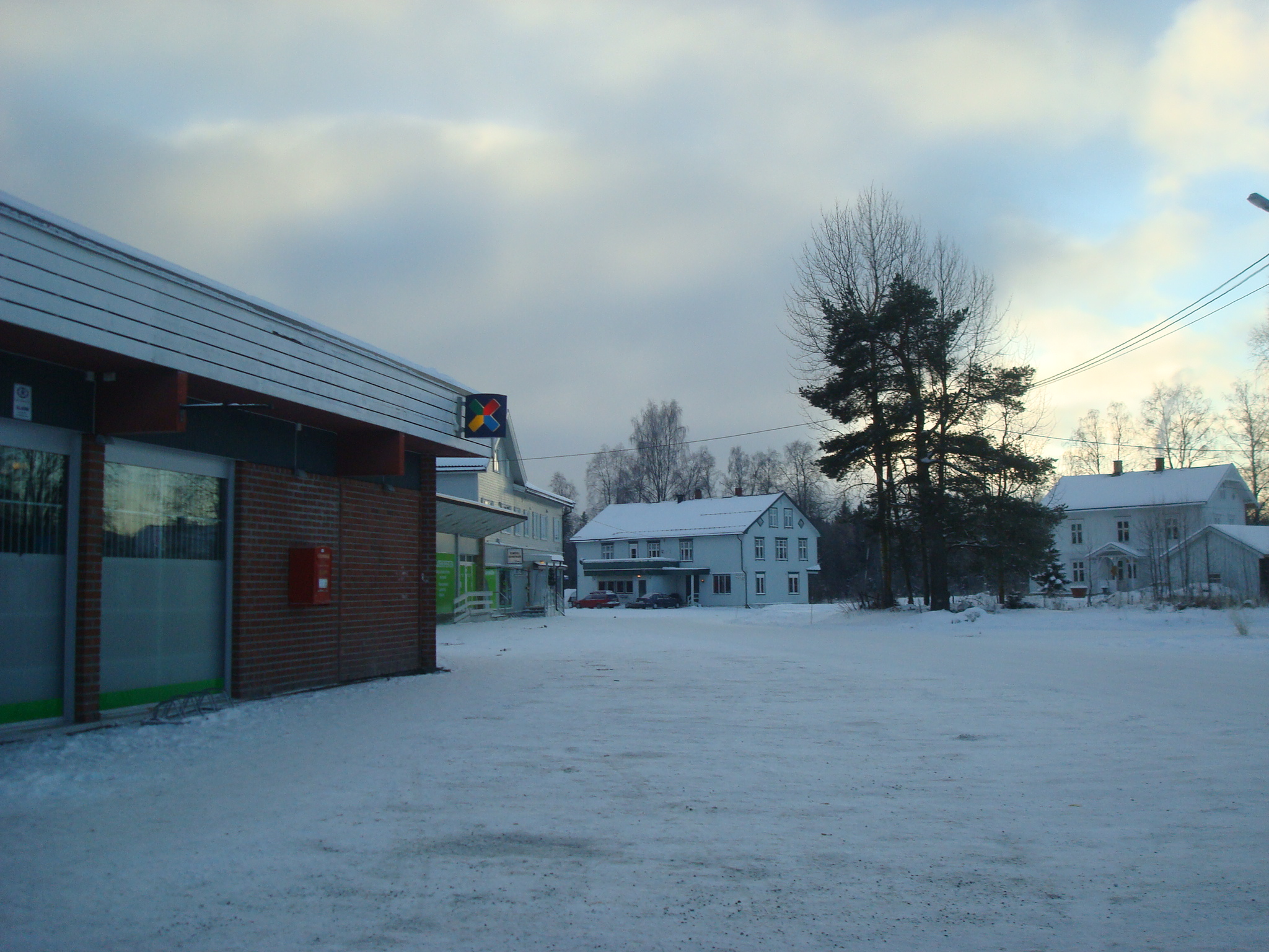 Fra Reinsvoll (ved stasjonen) i Vestre Toten, desember 2012.